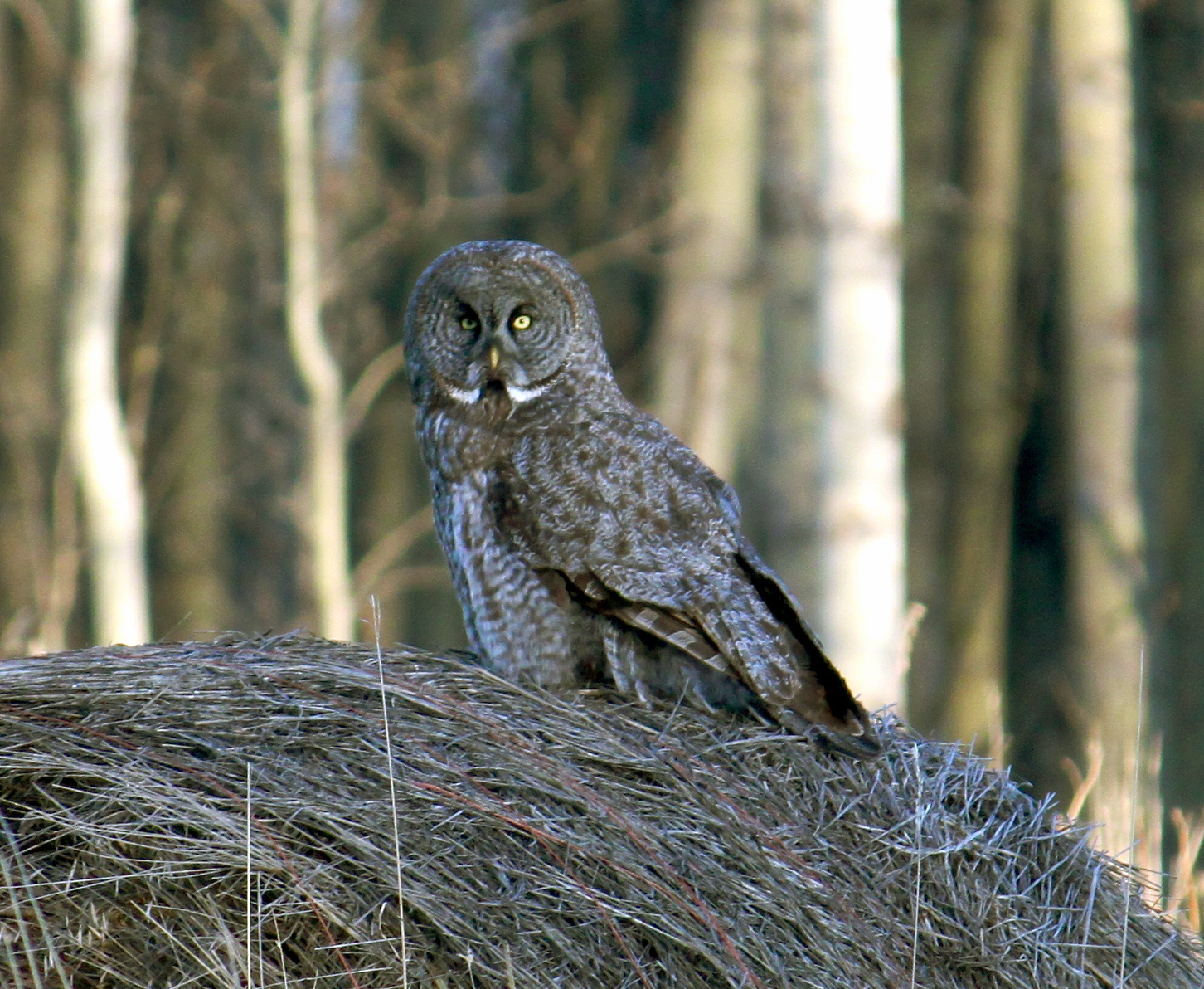 Great Grey Owl Strix nebulosa, Baldonnel, BC, Canada.